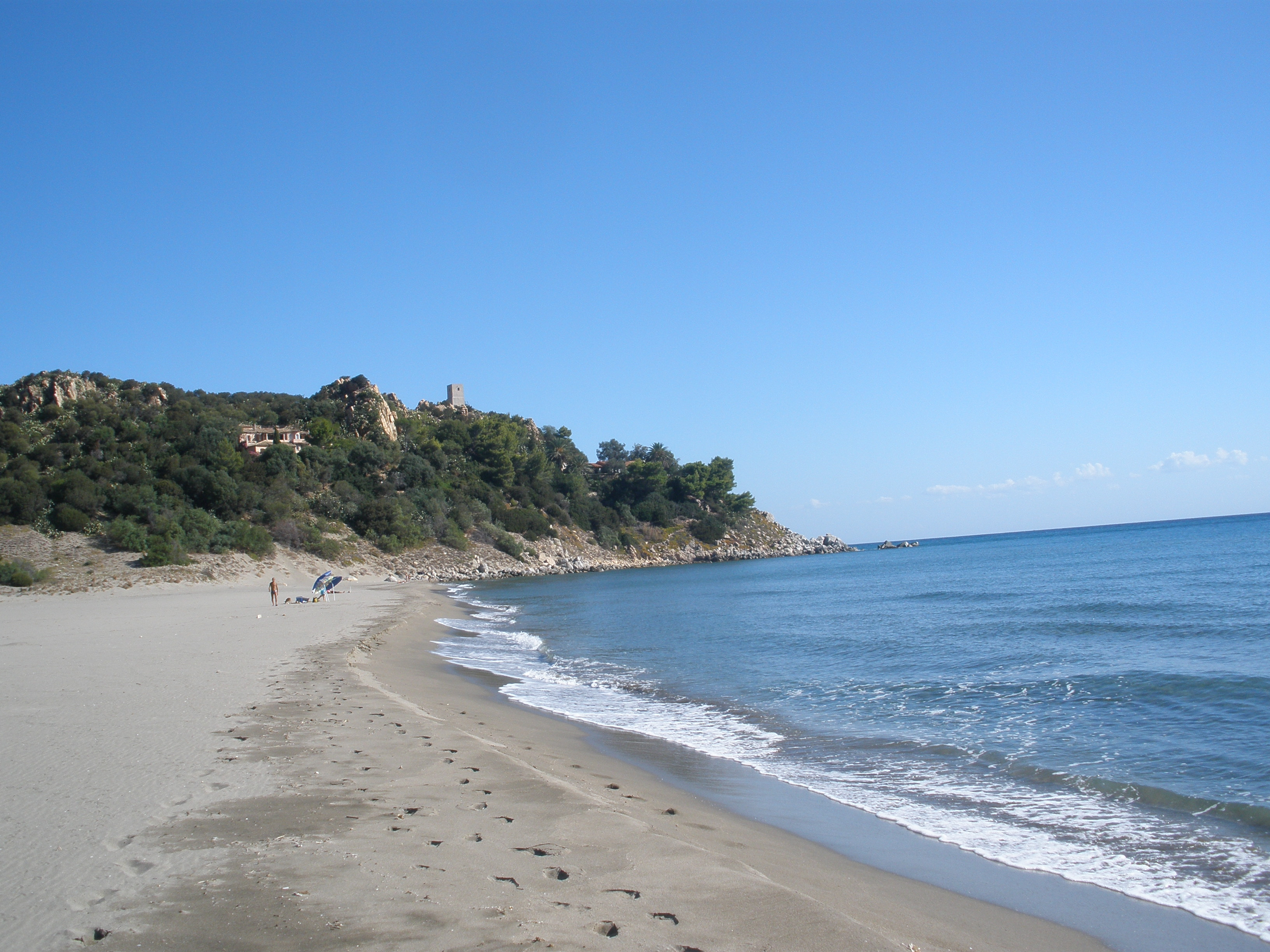 Spiaggia di Colostrai a circa 8 Km dal centro abitato di Muravera, percorrendo la vecchia S.S. 125 in direzione Cagliari